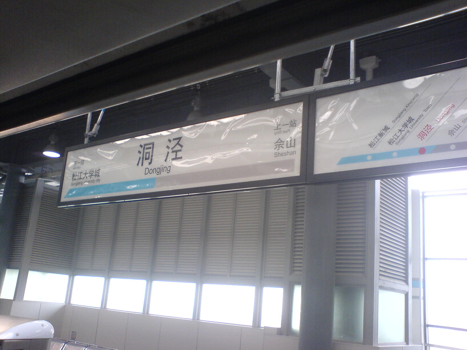 洞泾站站台